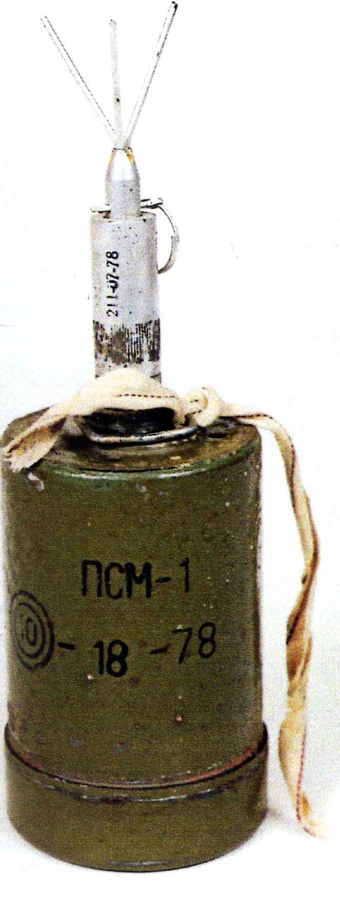 Bułgarska mina przeciwpiechotna PSM-1